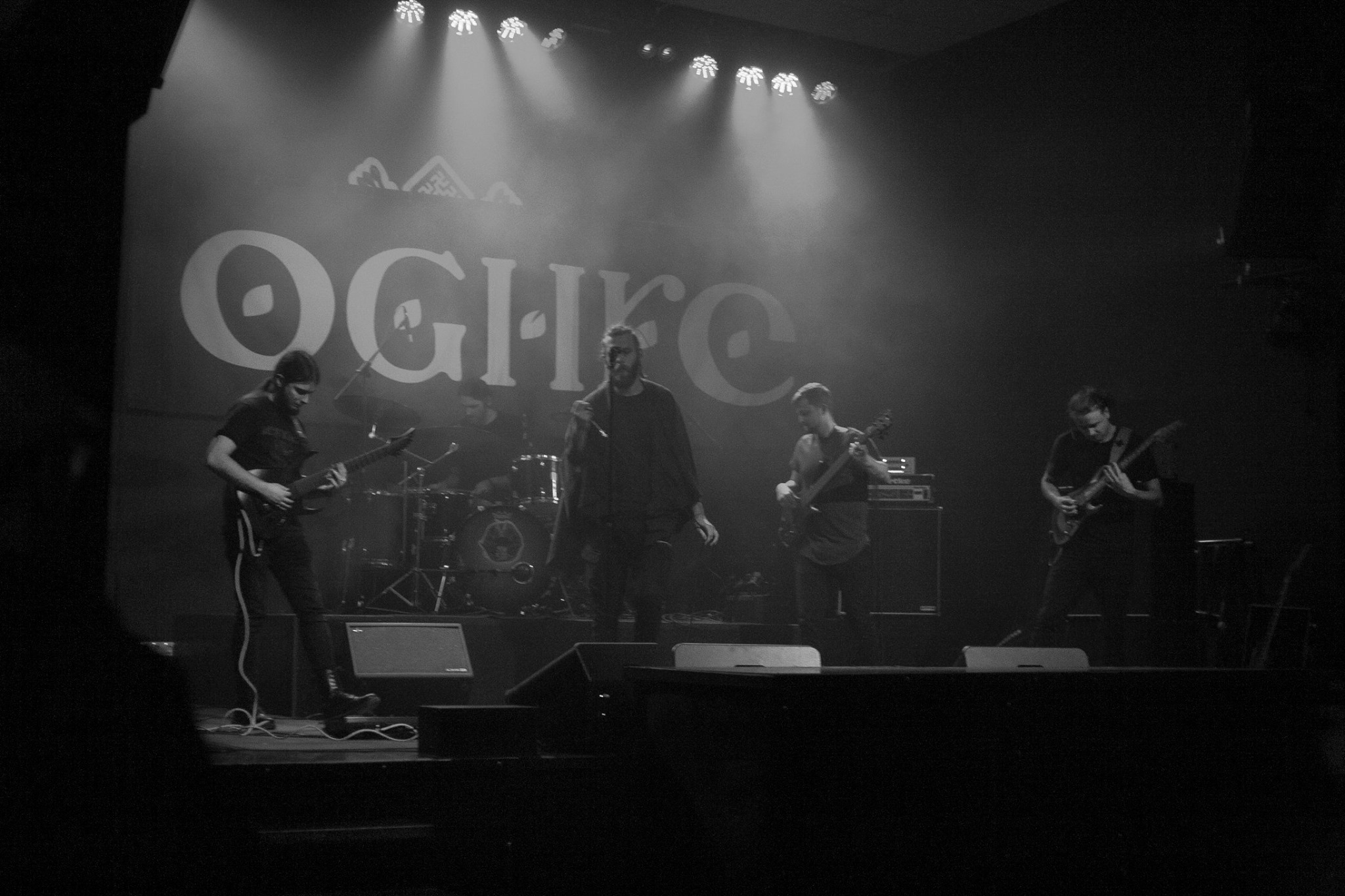 Grupa Oghre koncertā Melno Cepurīšu Balerijā Jelgavā, 2019. gada 25. novembrī. No kreisās: Toms Gaļinauskis, Normunds Balodis, Oskars Dreģis, Andis Zvejnieks, Kristaps Baķis